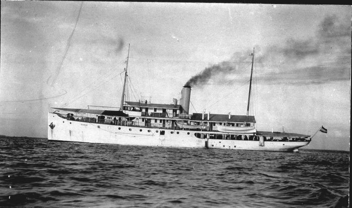 Foto. Het Gouvernementsstoomschip 'Deneb', die voor de regering de contacten onderhoud tussen de eilanden in de archipel